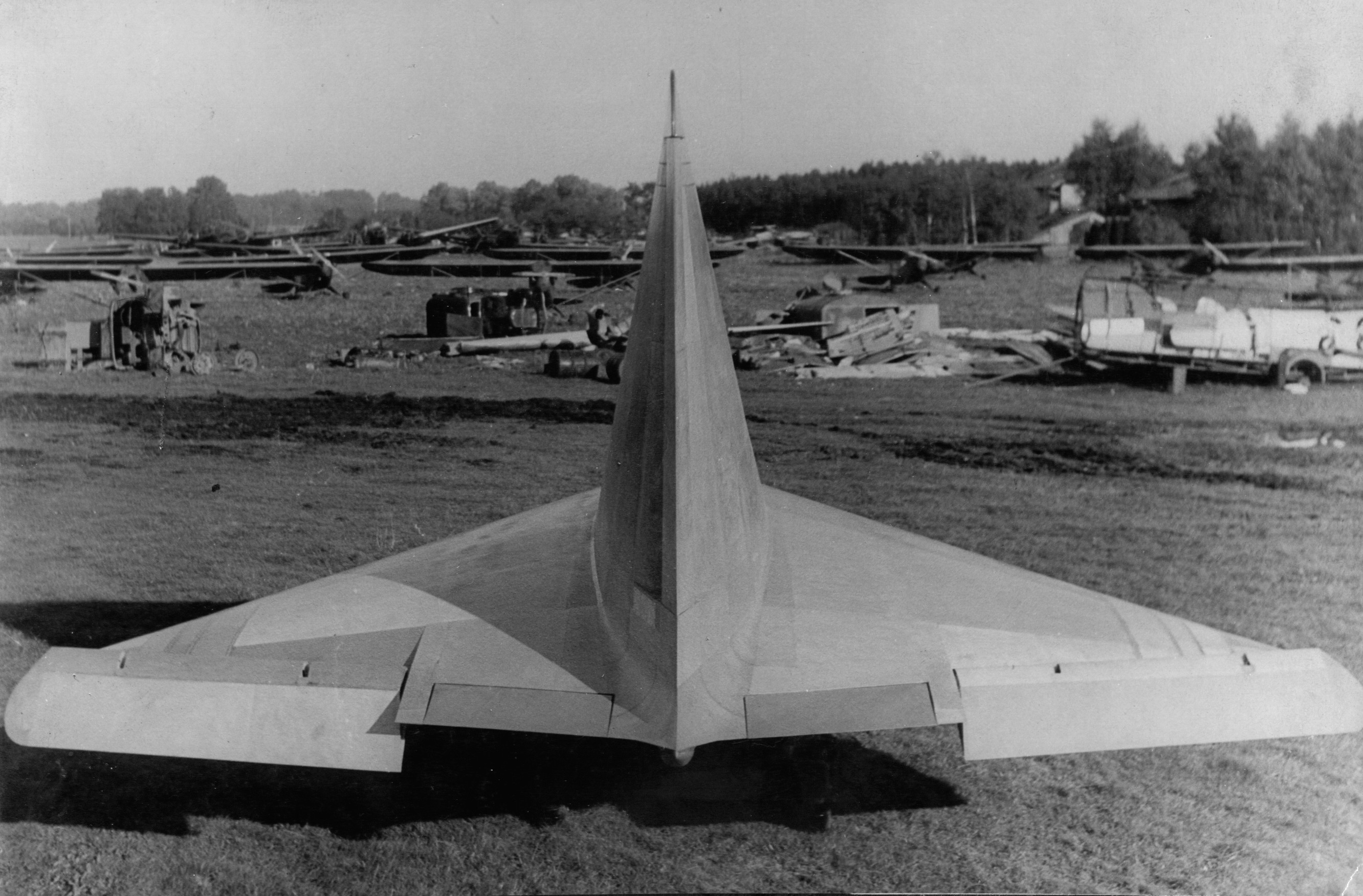 Die Akaflieg Darmstadt München DM 1 am Flughafen Prien am Chiemsee nach Kriegsende